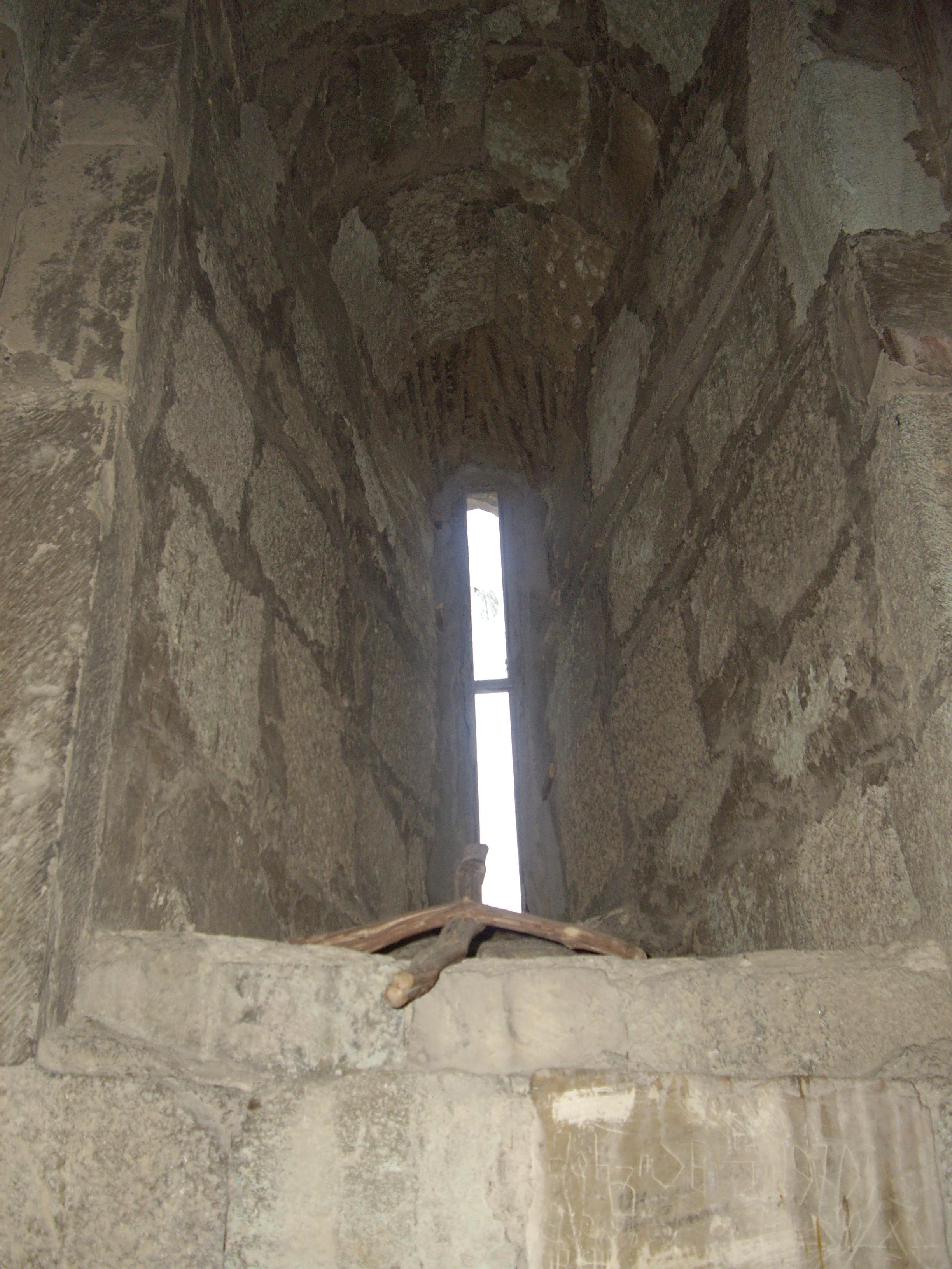 აღაიანის წმ. ნინოს ეკლესია - სამხრეთი სარკმელი